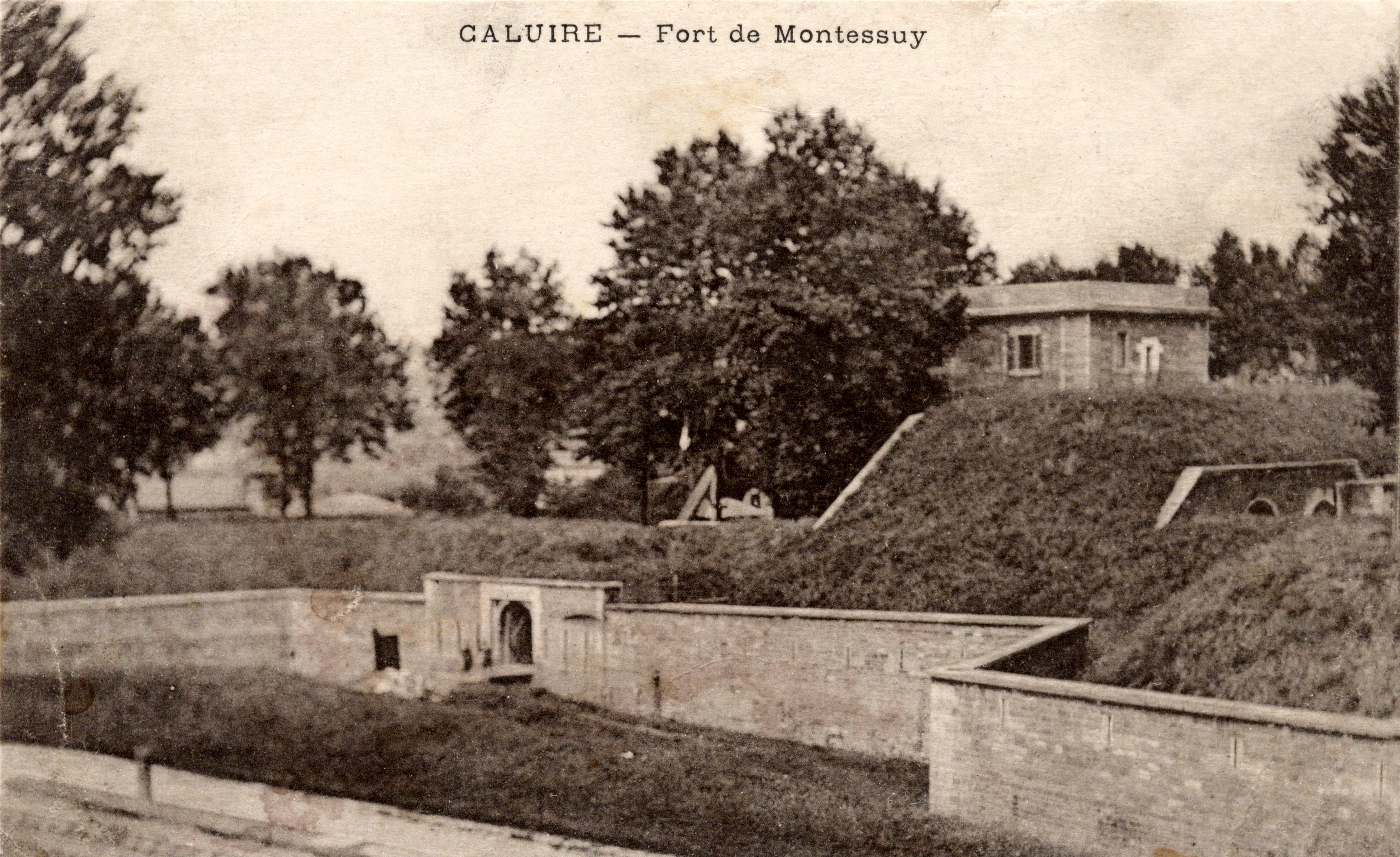 Entrée du Fort de Caluire. Contrairement à ce qui est indiqué sur la légende, ce n'est pas celui de Montessuy.